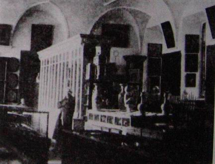 А. Брадоўскі ў сценах Віцебскага губернскага музея